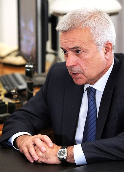 Президент ПАО "ЛУКОЙЛ" Вагит Юсуфович Алекперов